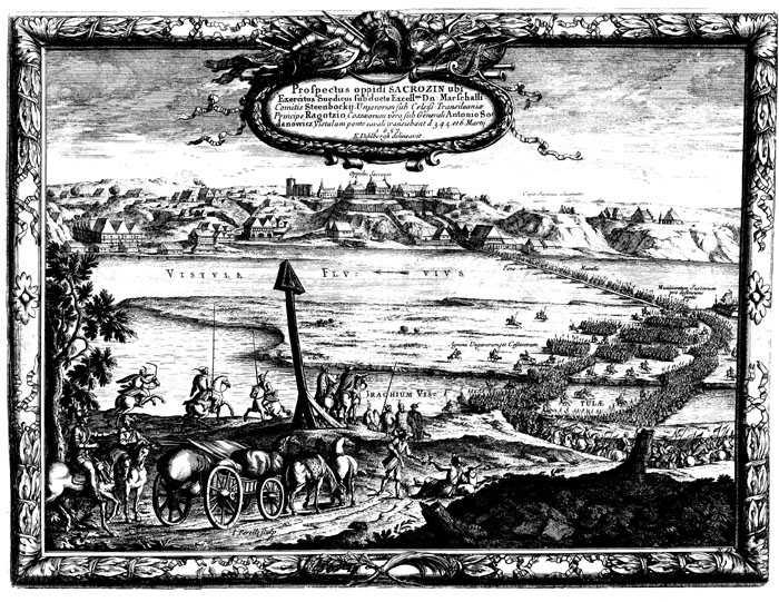 Zakroczym, 1656